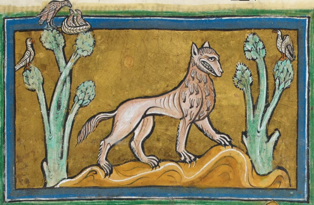 Leucrote - detail of a miniature from the Rochester Bestiary, BL Royal 12 F xiii